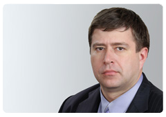 Александр Владимирович Коновалов